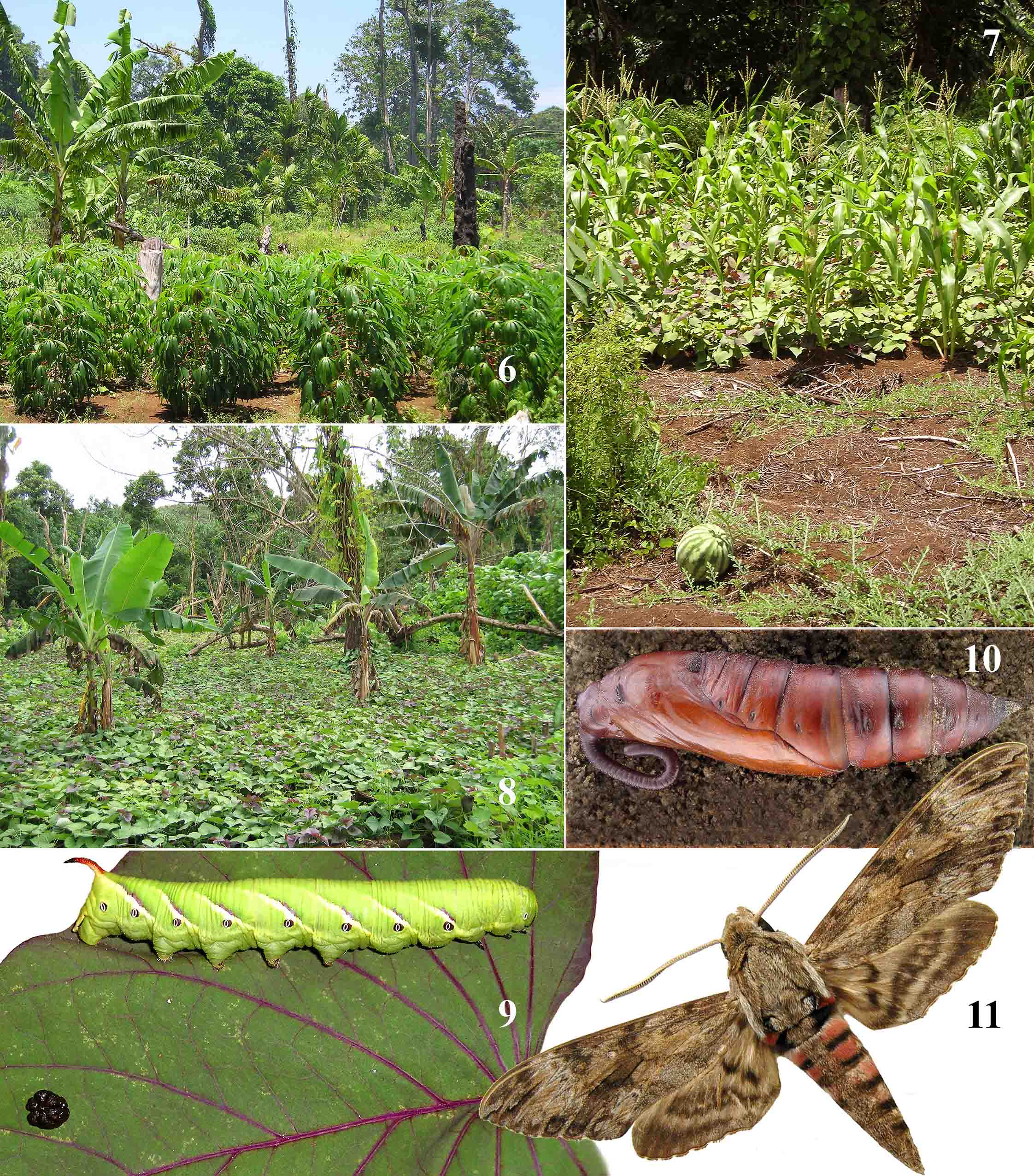 Henri-Pierre Aberlenc, Les savants de Lapérouse, la biodiversité et le peuplement de Vanikoro par les Insectes ː mosaïque d’espèces cultivées (photos 6 à 8) à Vanikoro, et chenille du papillon Sphinx Agrius convolvuli à Païou sur des feuilles de la Patate douce Hypomoea batatas (photos 9 à 11).